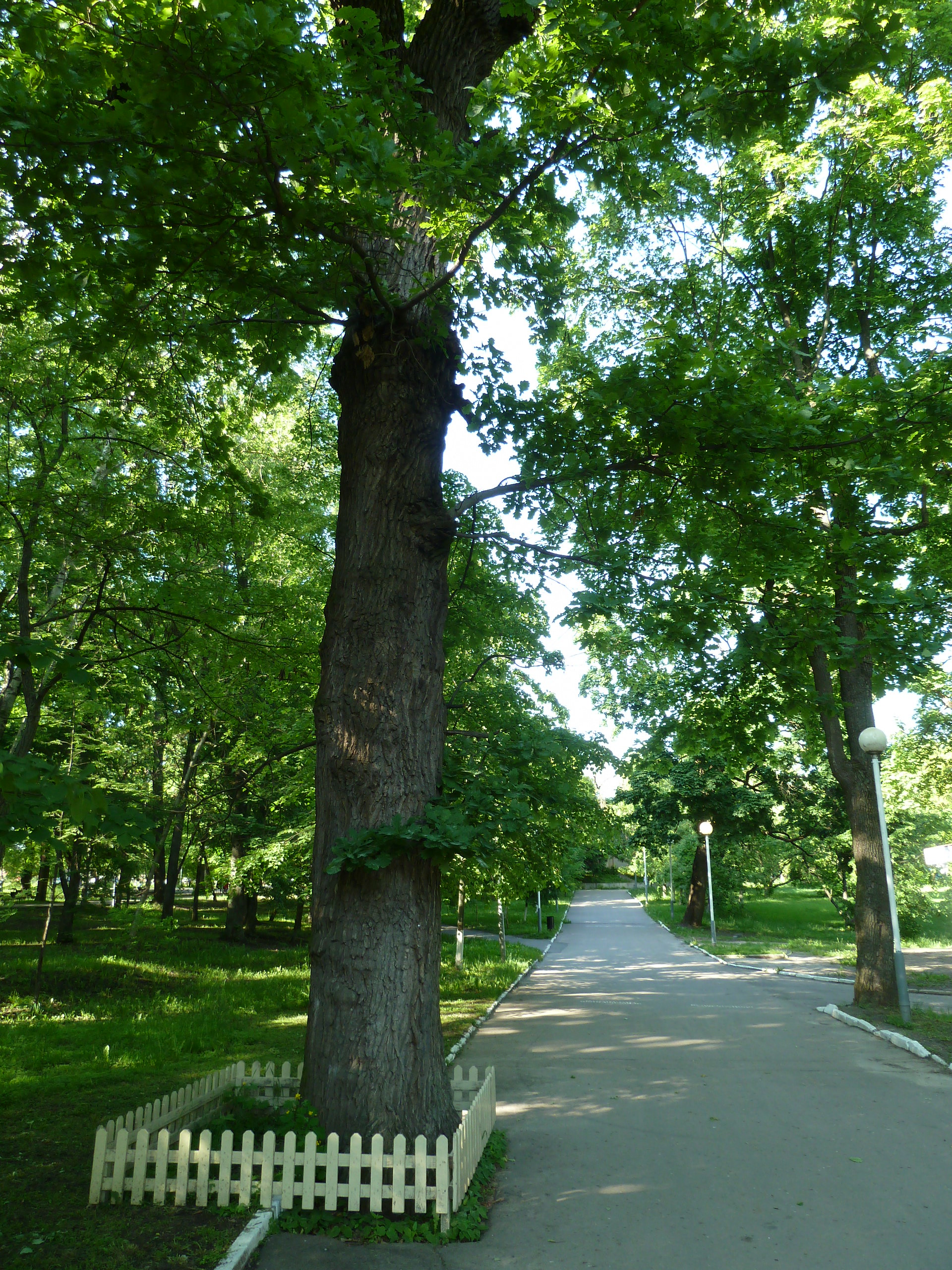 Старое реликтовое дерево